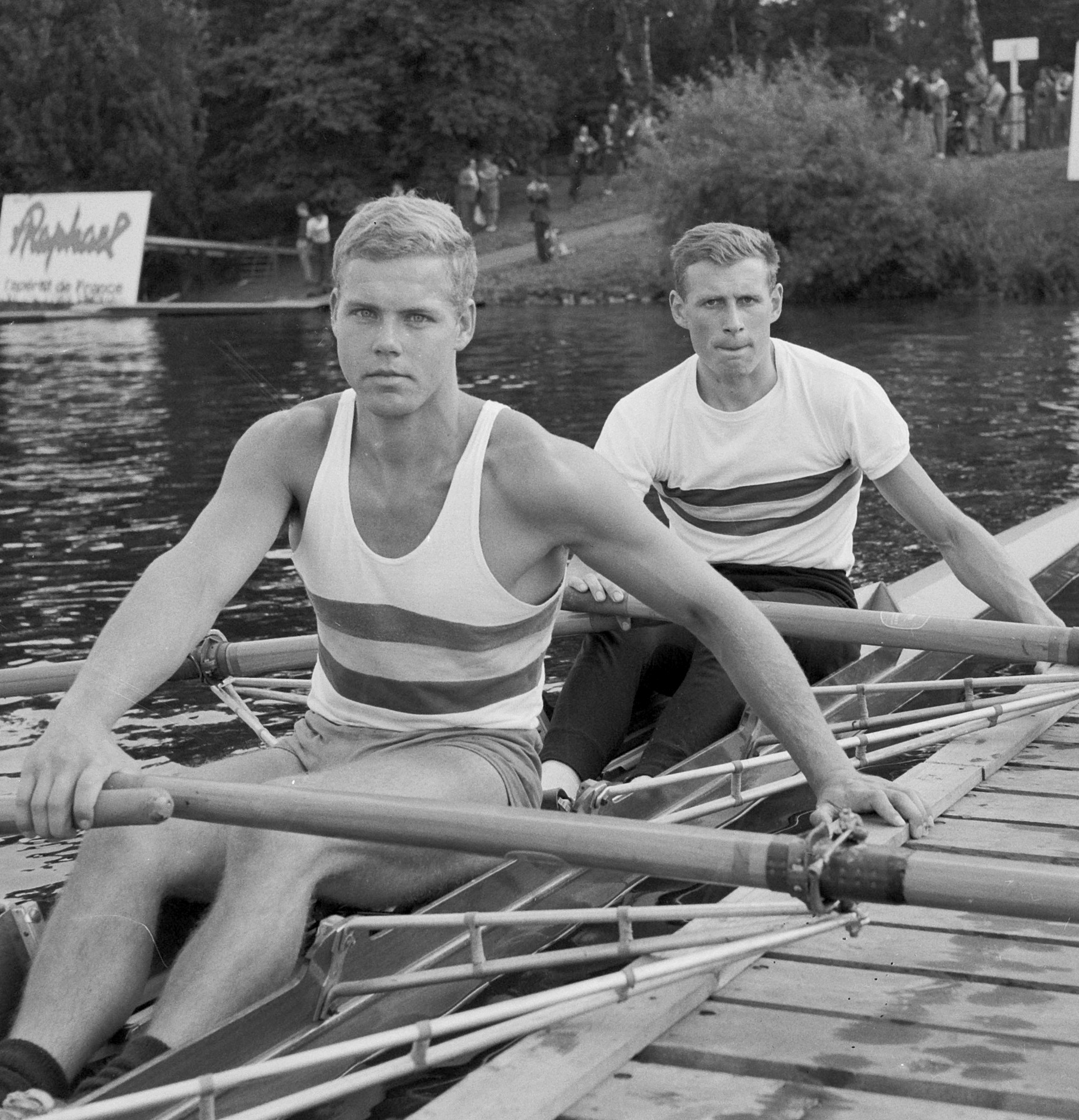 Dubbel twee van België, v.l.n.r. De Meulenmeester, De Hombreux